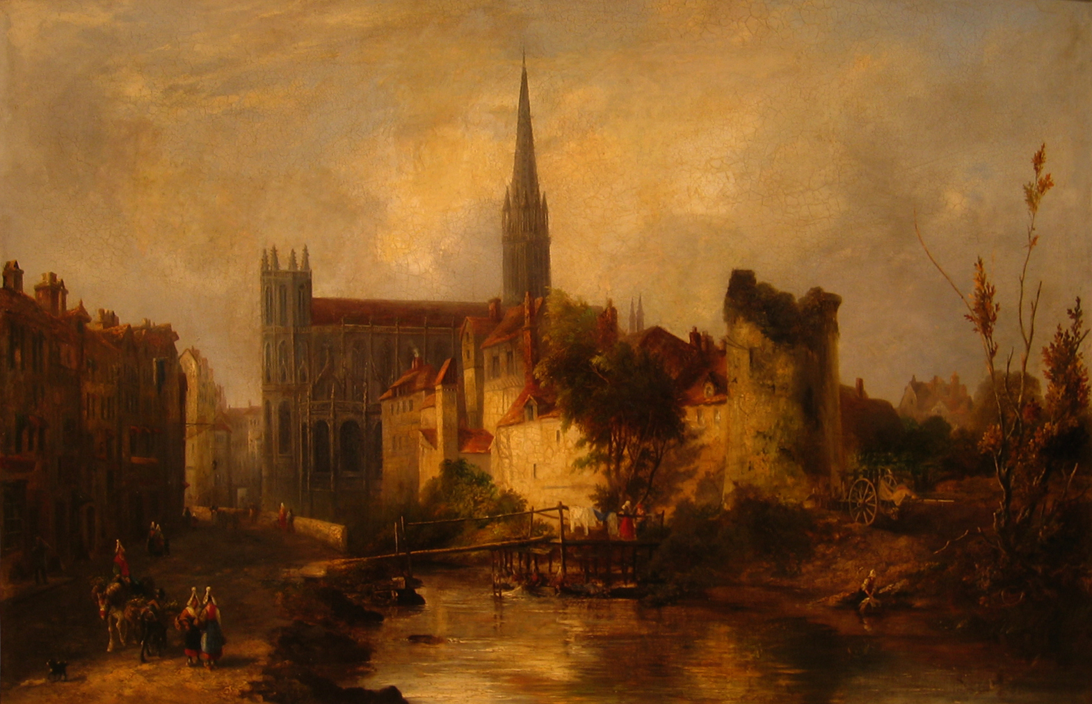 Vue du chevet de l'église Saint-Pierre et de l'Odon - Caen - William Fowler (1841)